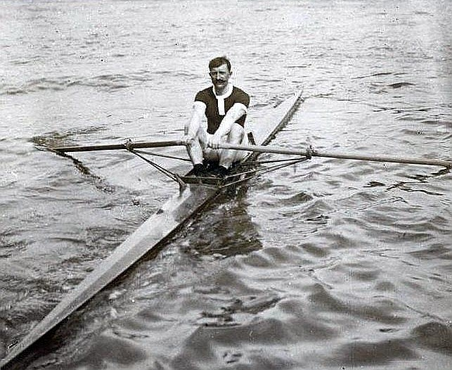 Gaston Delaplane aux'Régates Internationales' (vers 1910).